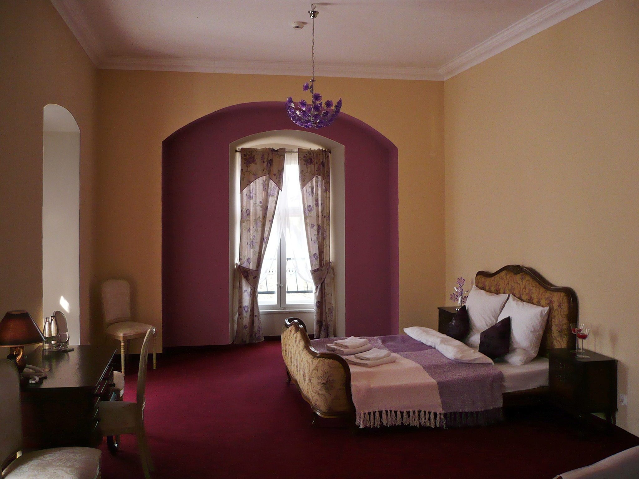 Nowa Ruda, ul. Kościelna 30 - Dwór Górny, obecnie hotel, XVII, XIX w. (zabytek nr A/940/652/WŁ z 25.05.1977)